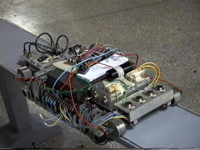 Prototipo 5 del TELMAGV